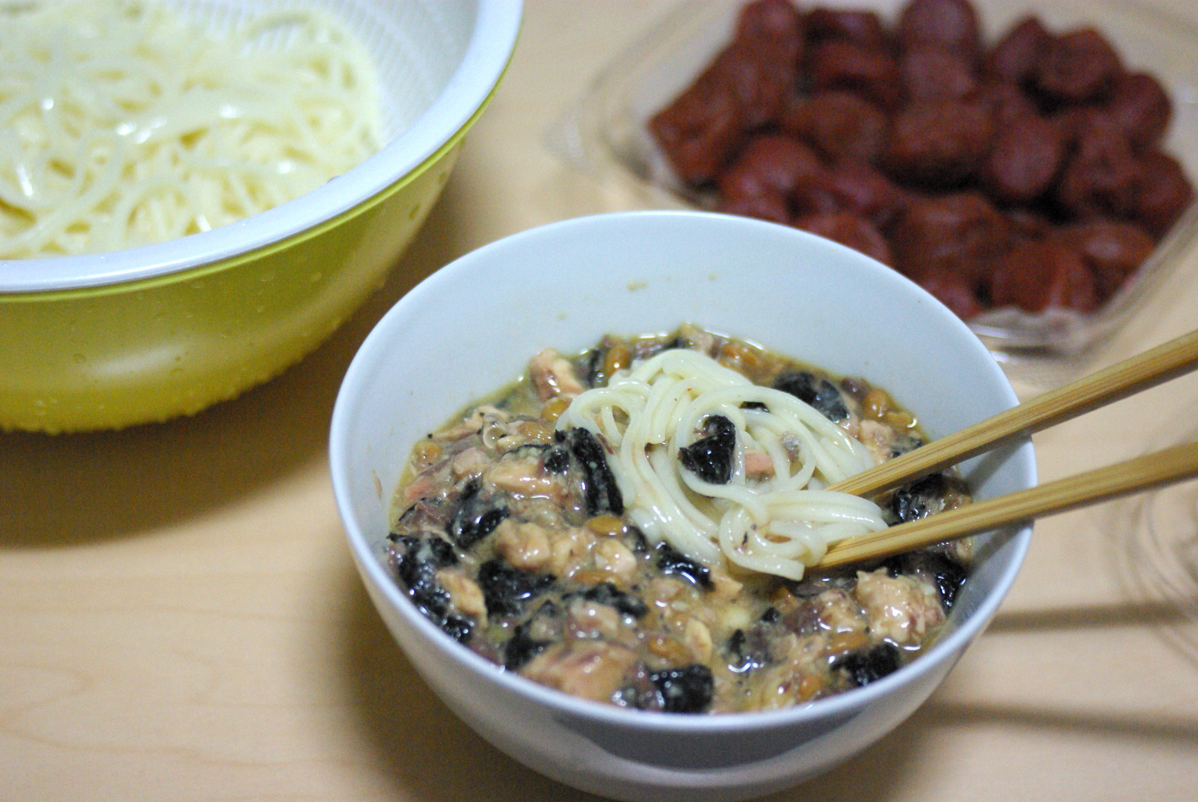 ひっぱりうどん